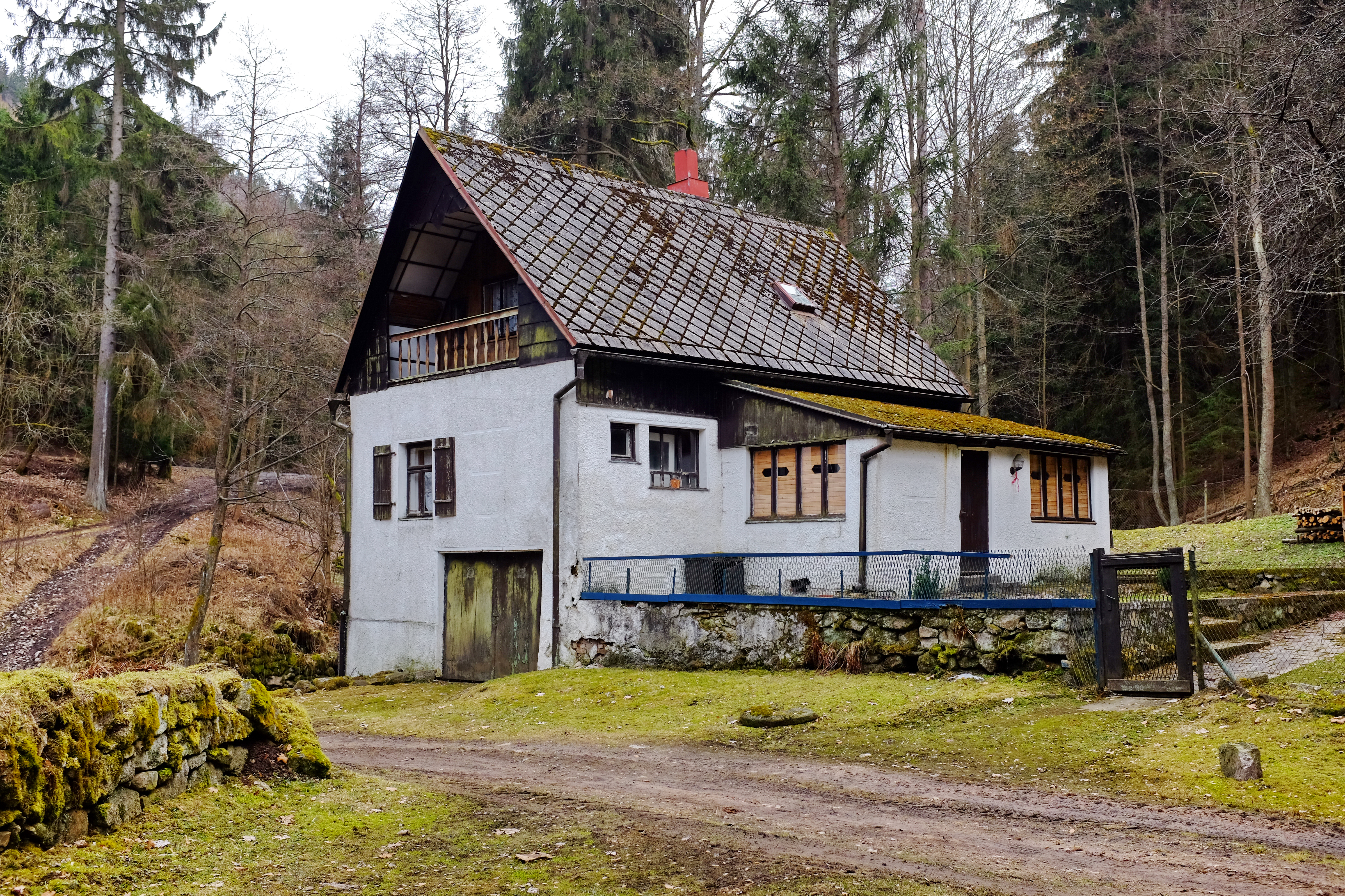 Lobezský potok, chata postavená na základech Lobezského mlýna, Slavkovský les, okres Sokolov